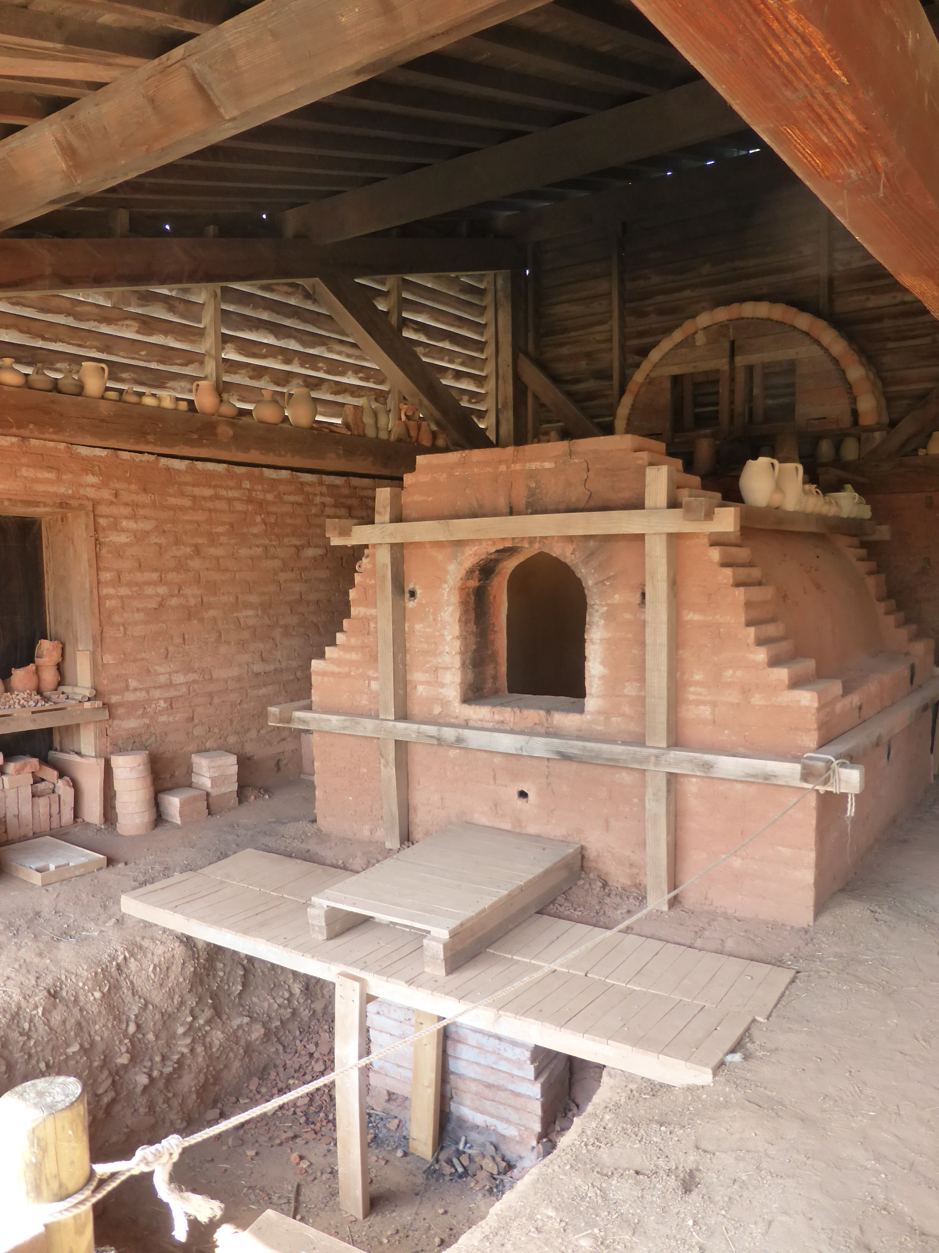 Sallèles-d'Aude (11 - Aude), musée Amphoralis. Reconstitution du four n° 4 à l'atelier de poterie antique de Sallèles-d'Aude (voir la photo du même sujet dans le dossier pour enseignants préparé par l'équipe du musée).